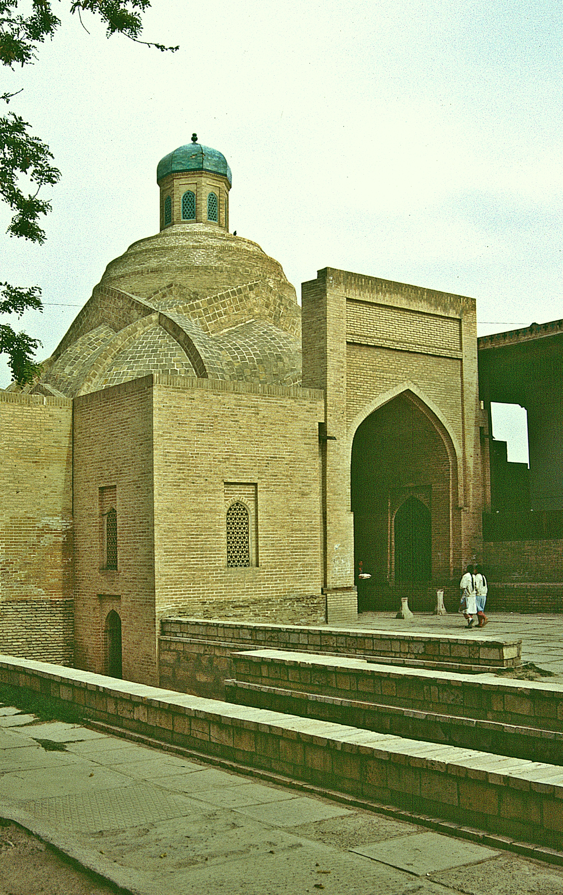 Buchara: Tak-i Saraffon